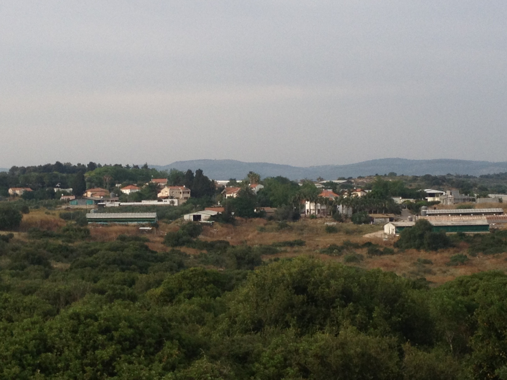 מושב עופר על רקע רכס הכרמל, מאי 2013